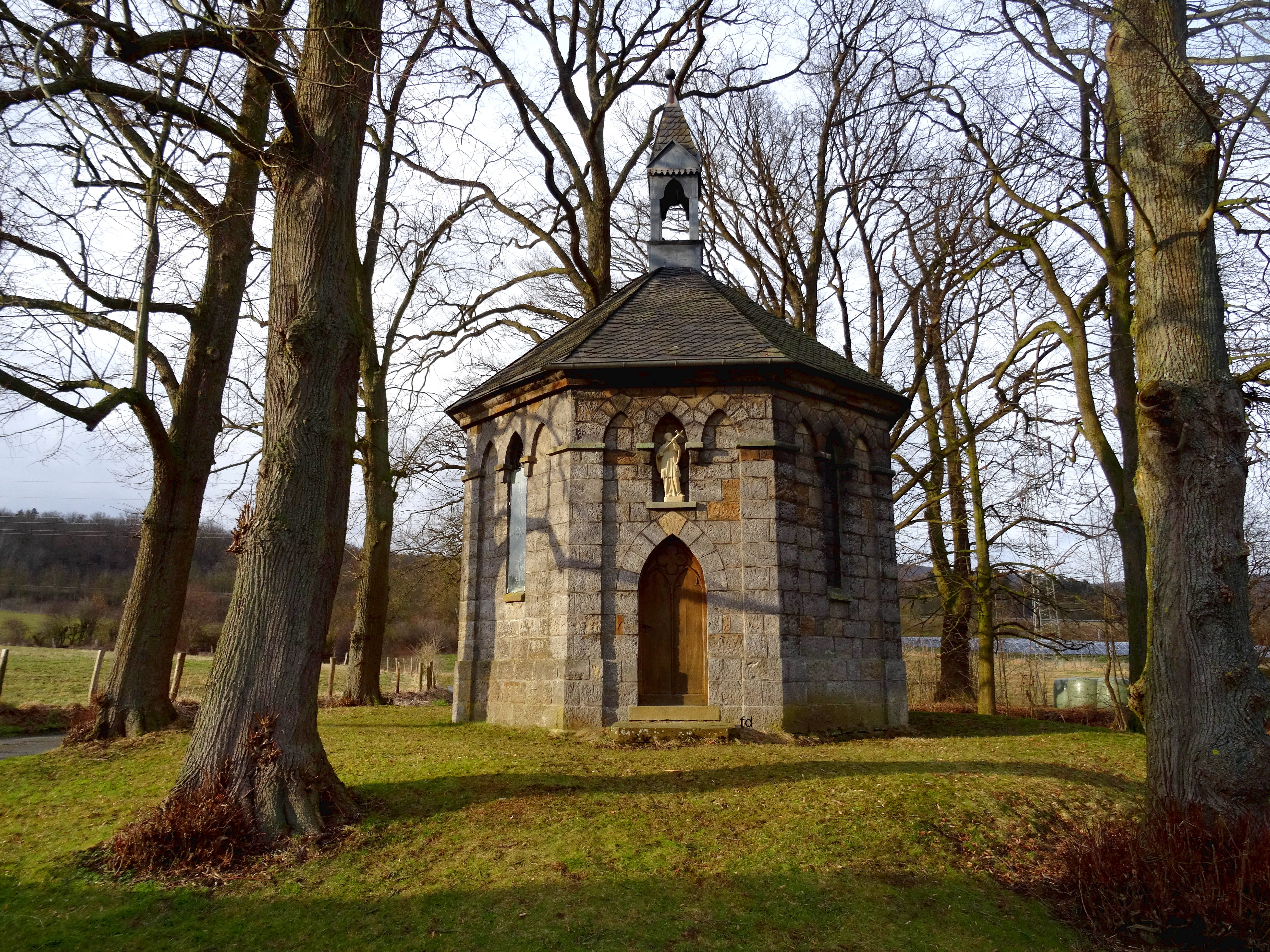 Franz-Xaver Kapelle Meschede auf dem Ensthof.